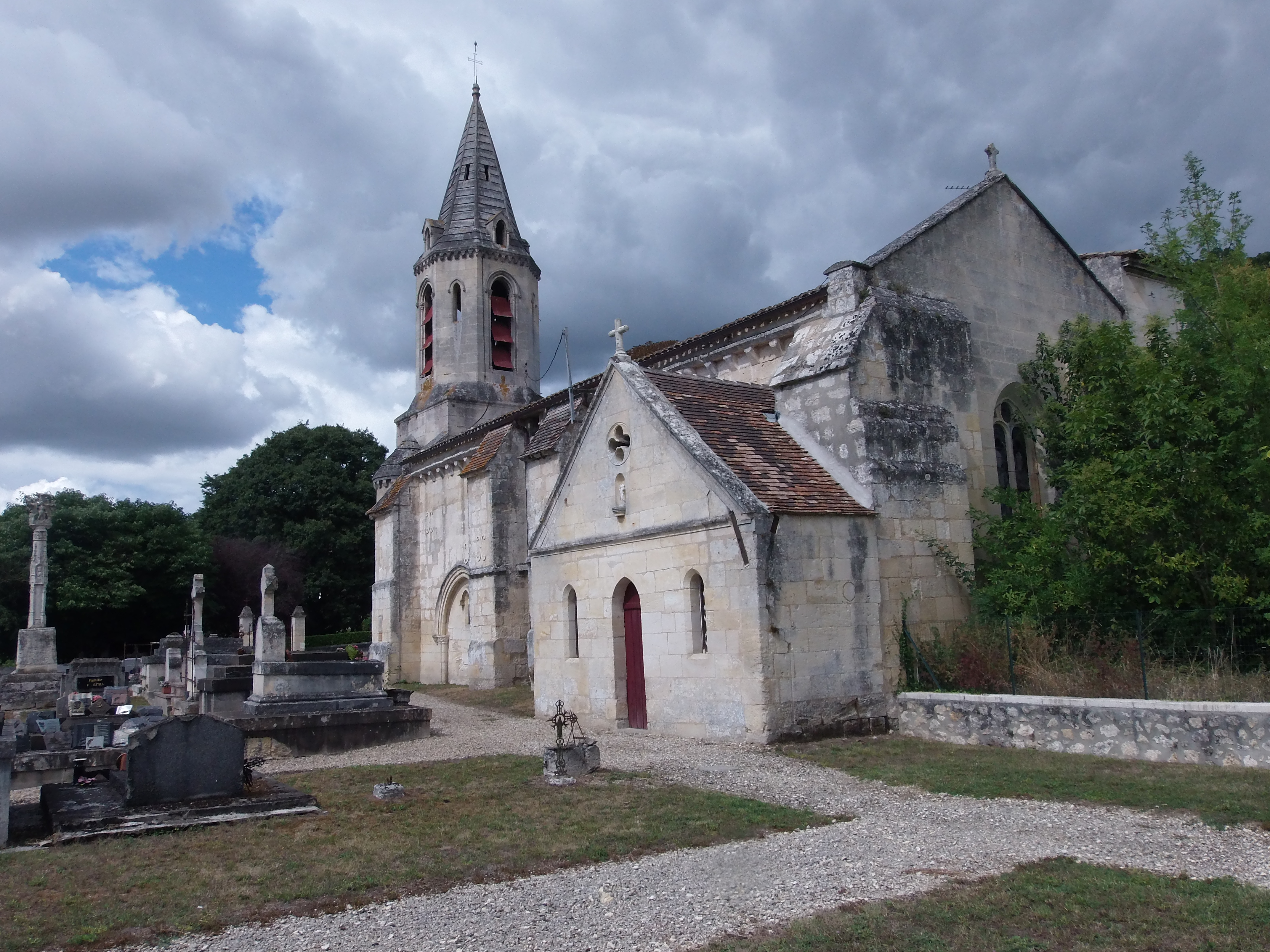 Église de Saint-Germain-de-la-Rivière (Gironde, France).